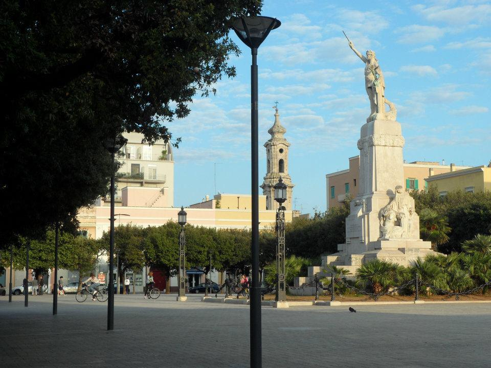 Veduta di Piazza Vittorio Emanuele a Monopoli, donata al sottoscritto --Monopoli91 (msg)